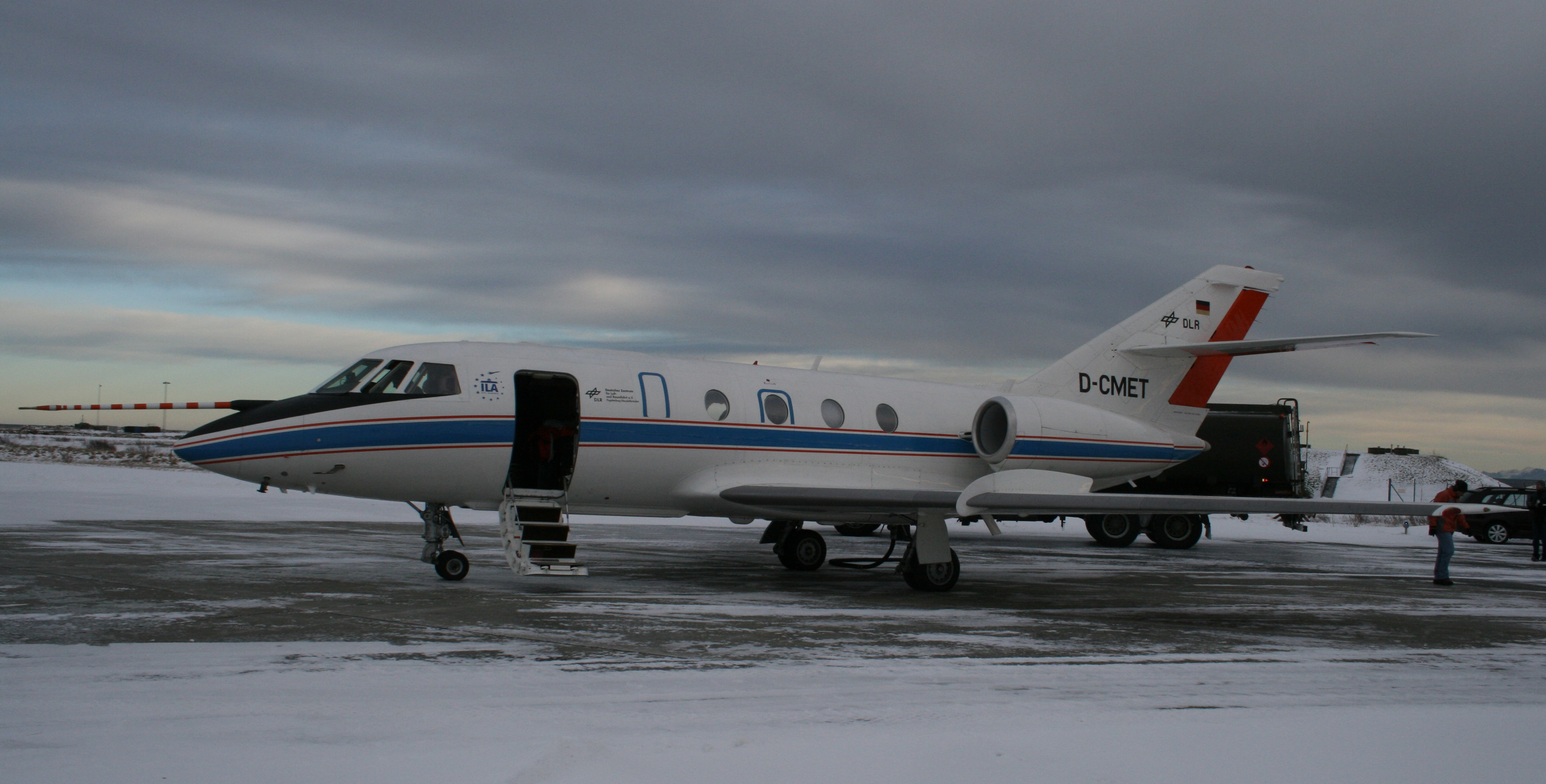 Forskningsflyet Dassault Falcon 20E, kjennetegn D-CMET, eid av Deutschen Zentrum für Luft- und Raumfahrt (DLR), spesialutstyrt for meteorologiske observasjoner/forskning. Foto fra Andøya 2008.